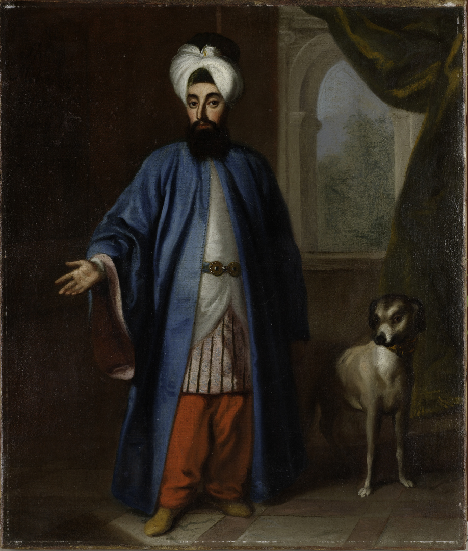 Mehmed Said Efendi, Ressamı Belirsiz (George Engelhardt Schröder’den, 45 x 38 cm,18. Yüzyıl)